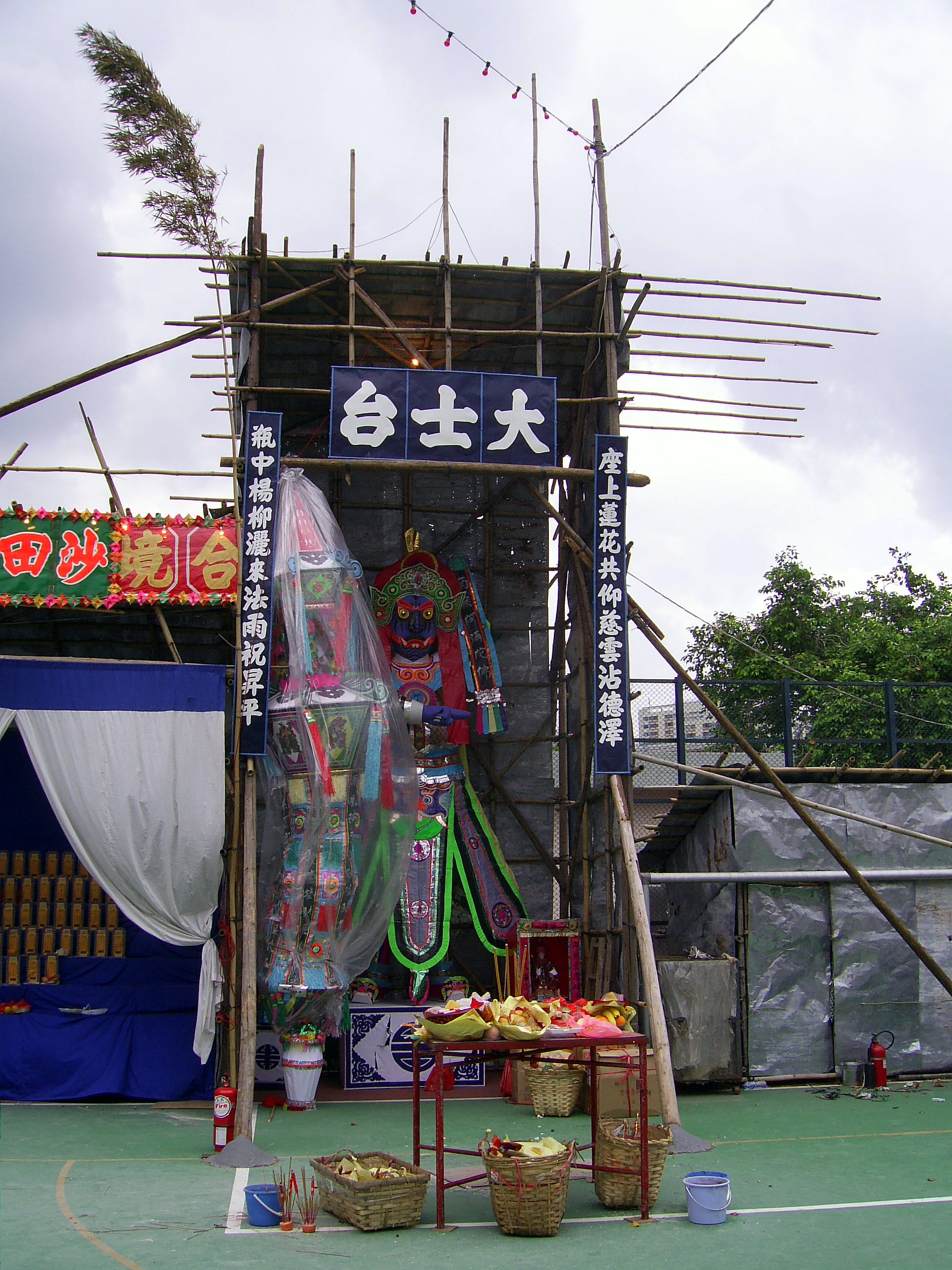 中文（香港）: 沙田盂蘭勝會大士台